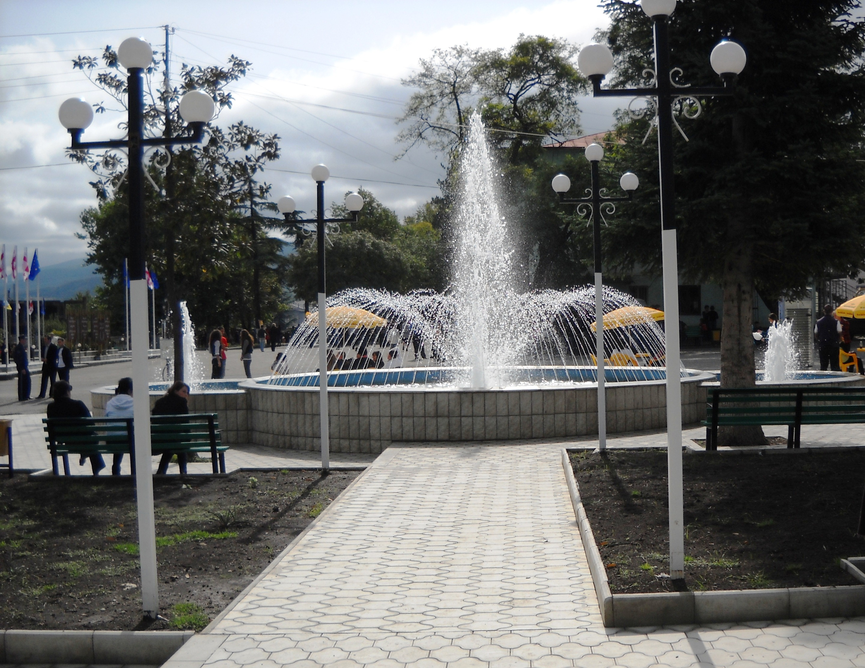 ახმეტის ცენტრალური მოედანი